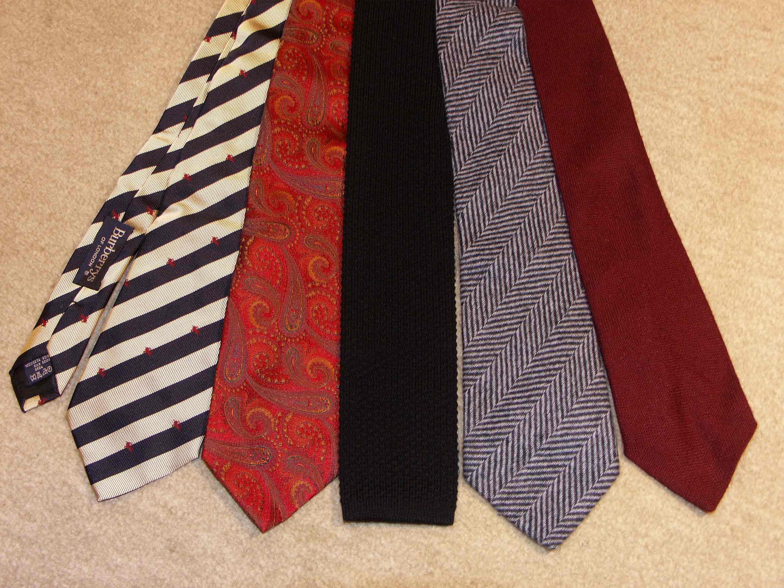 Krawattenarten (von links nach rechts): 2 Seidenkrawatten by Burberry, Edsor Kronen, 1 Strickkrawatte by Glengala, 1 Wollkrawatte Cashmere by Etro, 1 Wollkrawatte Schurwolle